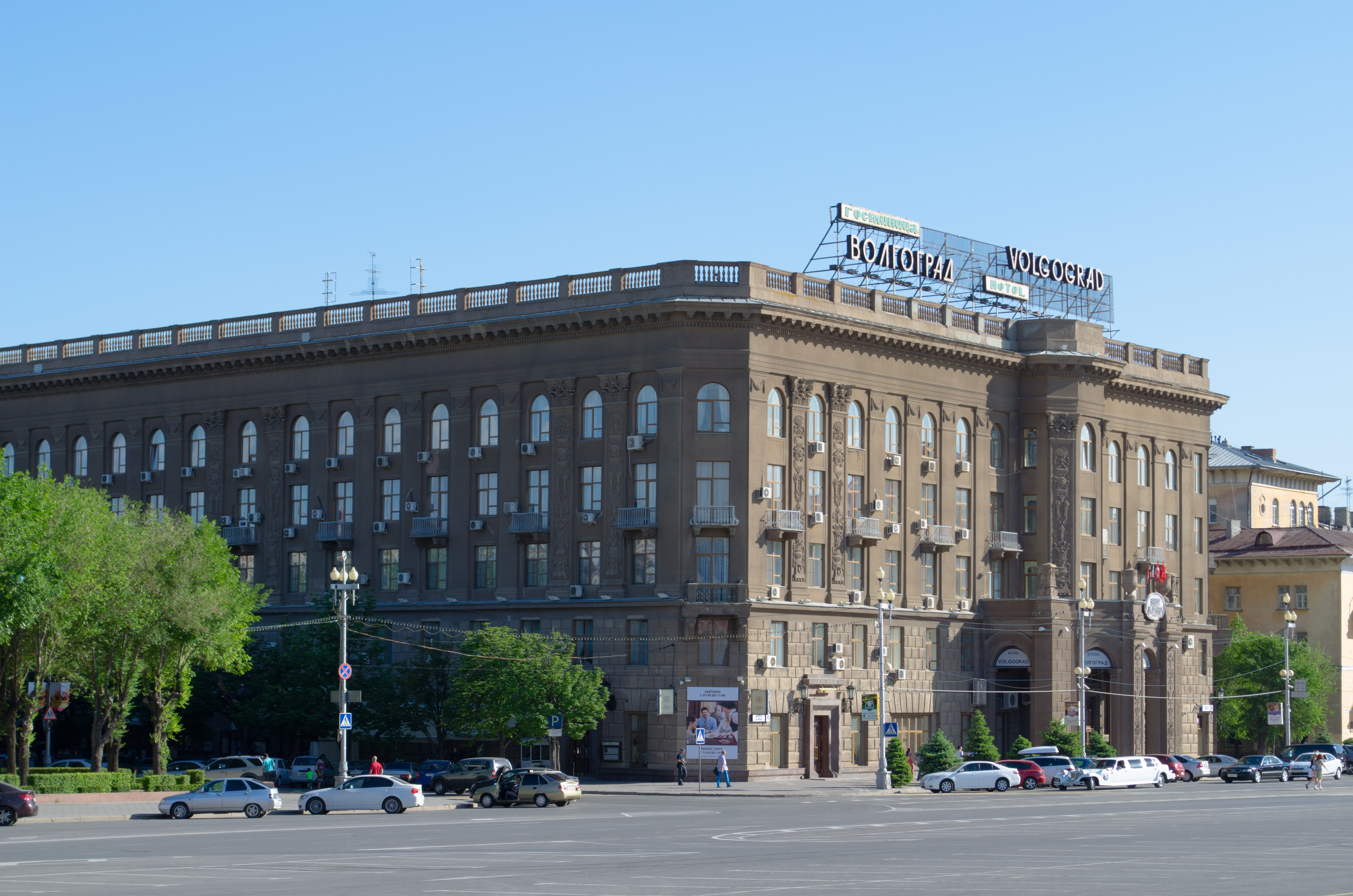 Здание гостиницы "Волгоград", расположенной на площади Павших Борцов.